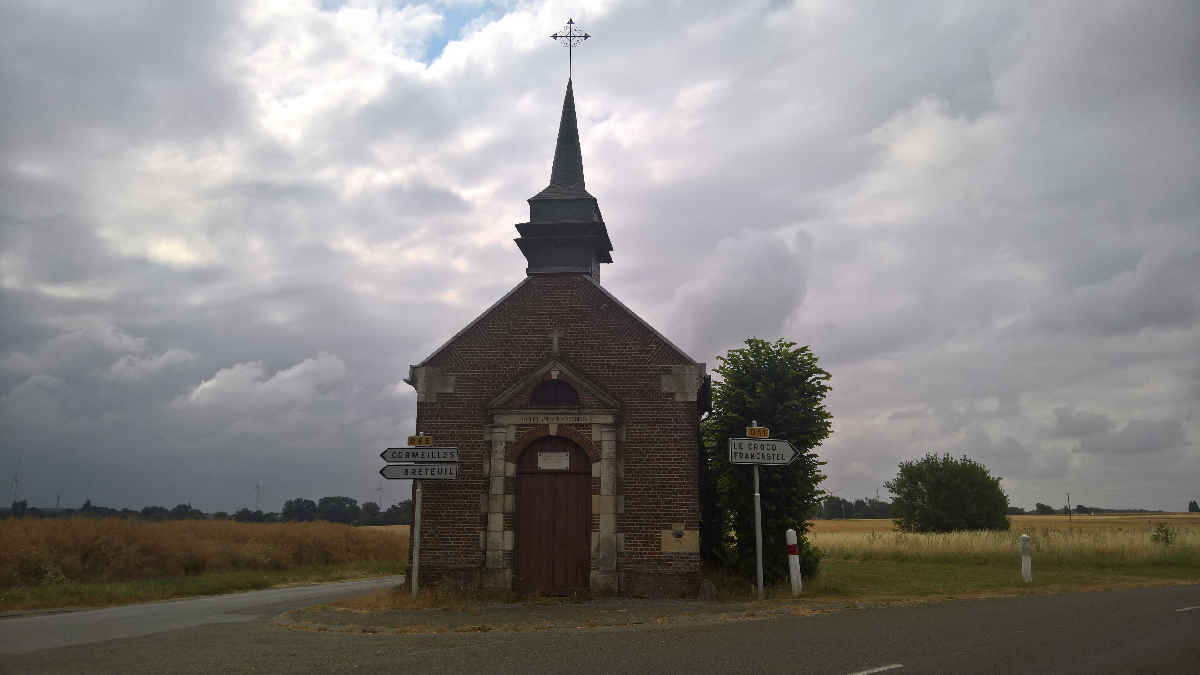 Cormeilles (Oise) : Chapelle Notre-Dame de Bon Secours